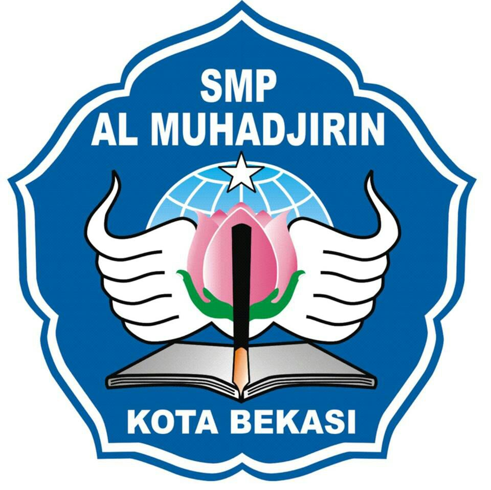 logo smp al muhadjirin bekasi